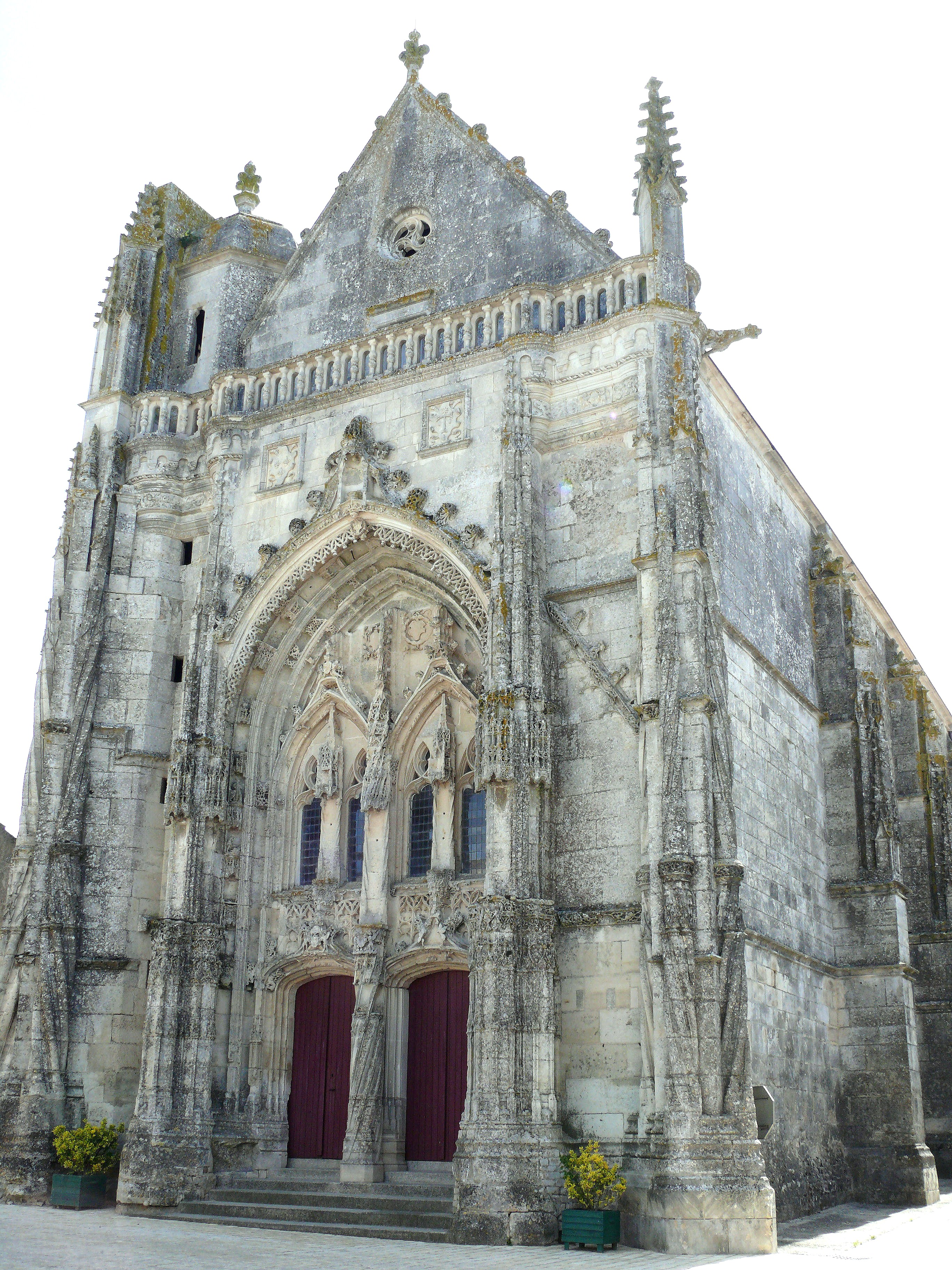 Saint-Marc-la-Lande - Collégiale de la commanderie Saint-Antoine-de-la-Lande